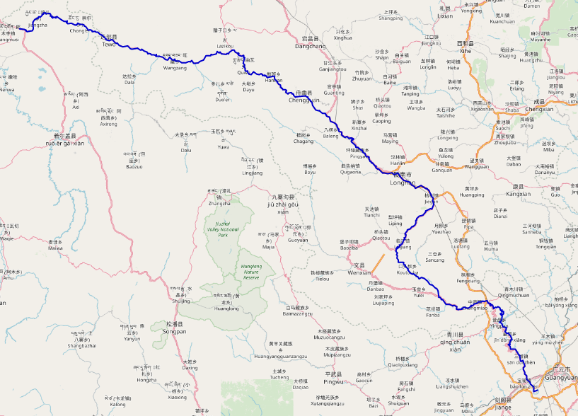 carte réalisée sur umap This map may be incomplete, and may contain errors. Don't rely solely on it for navigation.